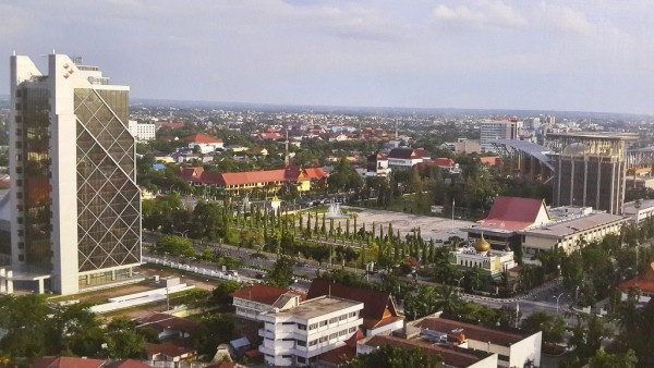 Salah satu sudut Kota Pekanbaru dari udara